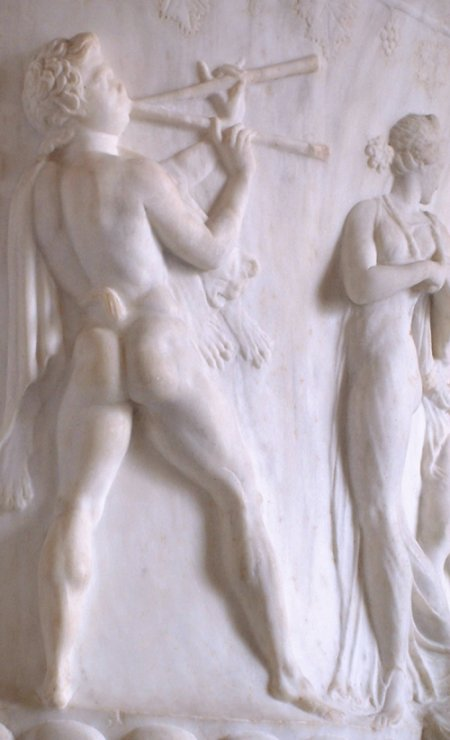 Joueur d'aulos, détail du vase Borghèse (fr:-40/fr:-30), musée du Louvre (Ma 86)